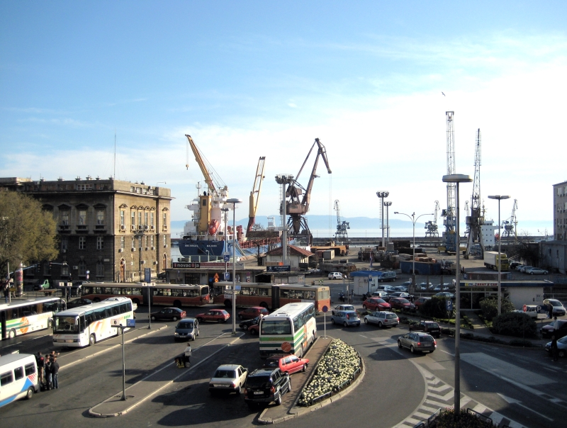 autobusni kolodvor Žabica i dio Luke Rijeka, Rijeka